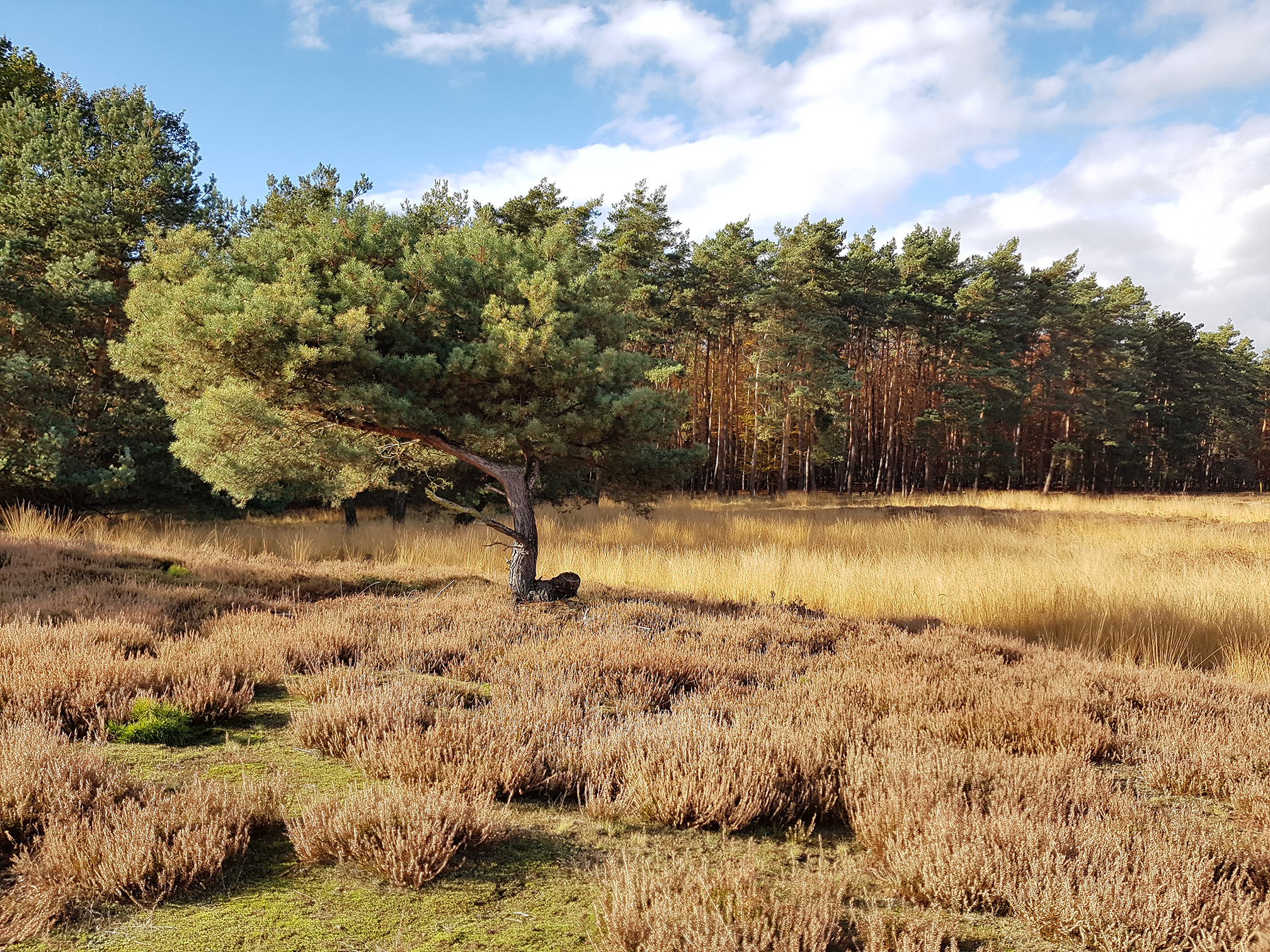 Strauch (Kiefer?) am westlichen Rand der Schneise unter der Stromtrasse an der Startbahn West im FFH-Gebiet 5917-302 Heidelandschaft westlich Mörfelden-Walldorf mit angrenzenden Flächen im Kreis Groß-Gerau